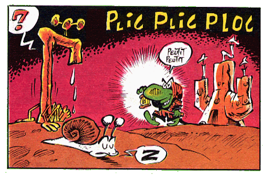 Les aventures potagères du Concombre Masqué, page 37. À l'arrière-plan, le cactus-blockhaus, demeure du Concombre.